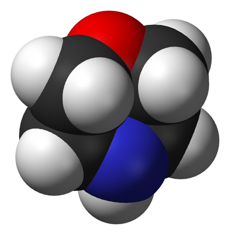 morfolin 3D